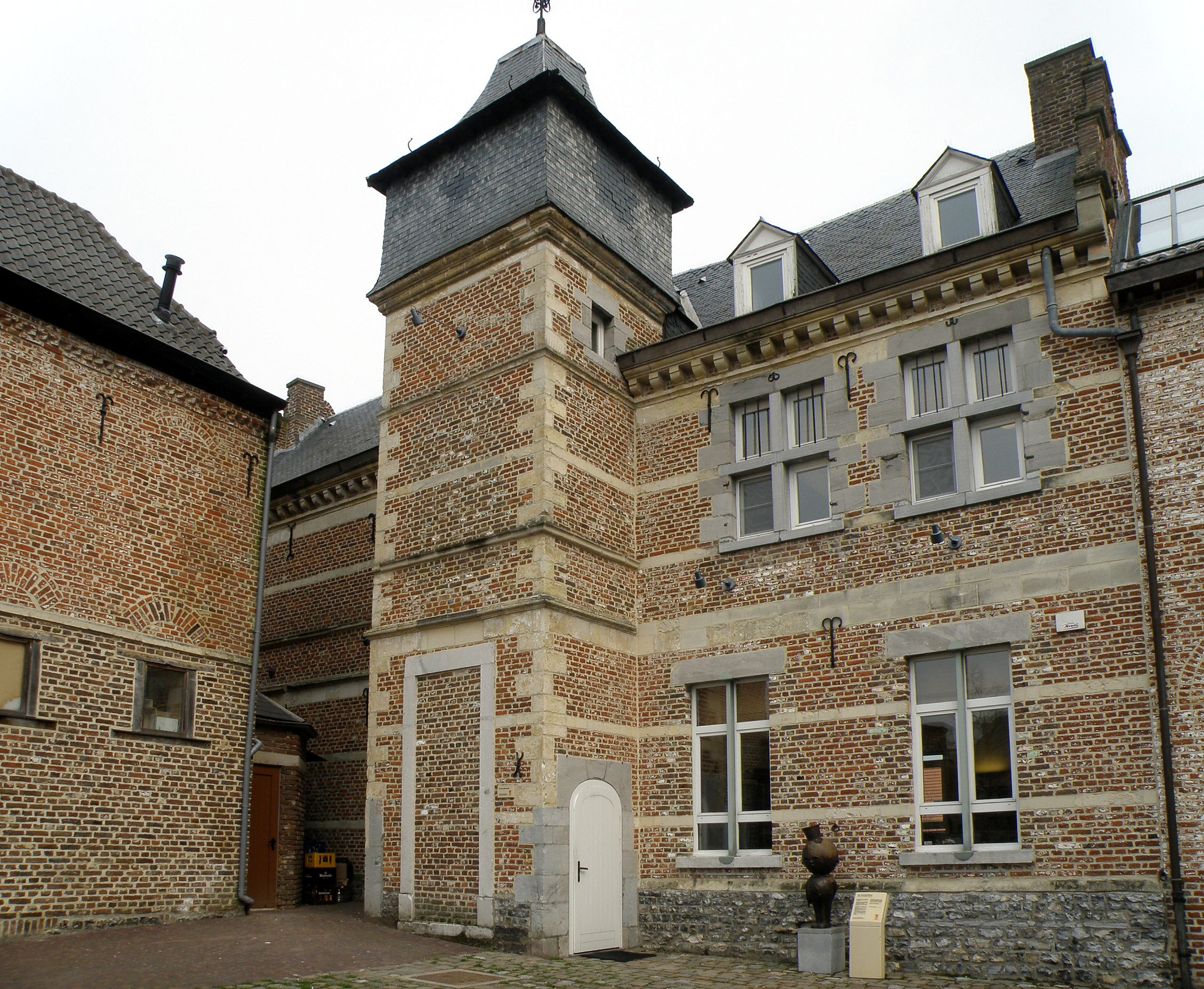 Looz (en néerl. Borgloon), prov. du Limbourg, Belgique. Maison dite des Chanoines (néerl. Kanunnikenhuis), 2e moitié XVIIe siècle.